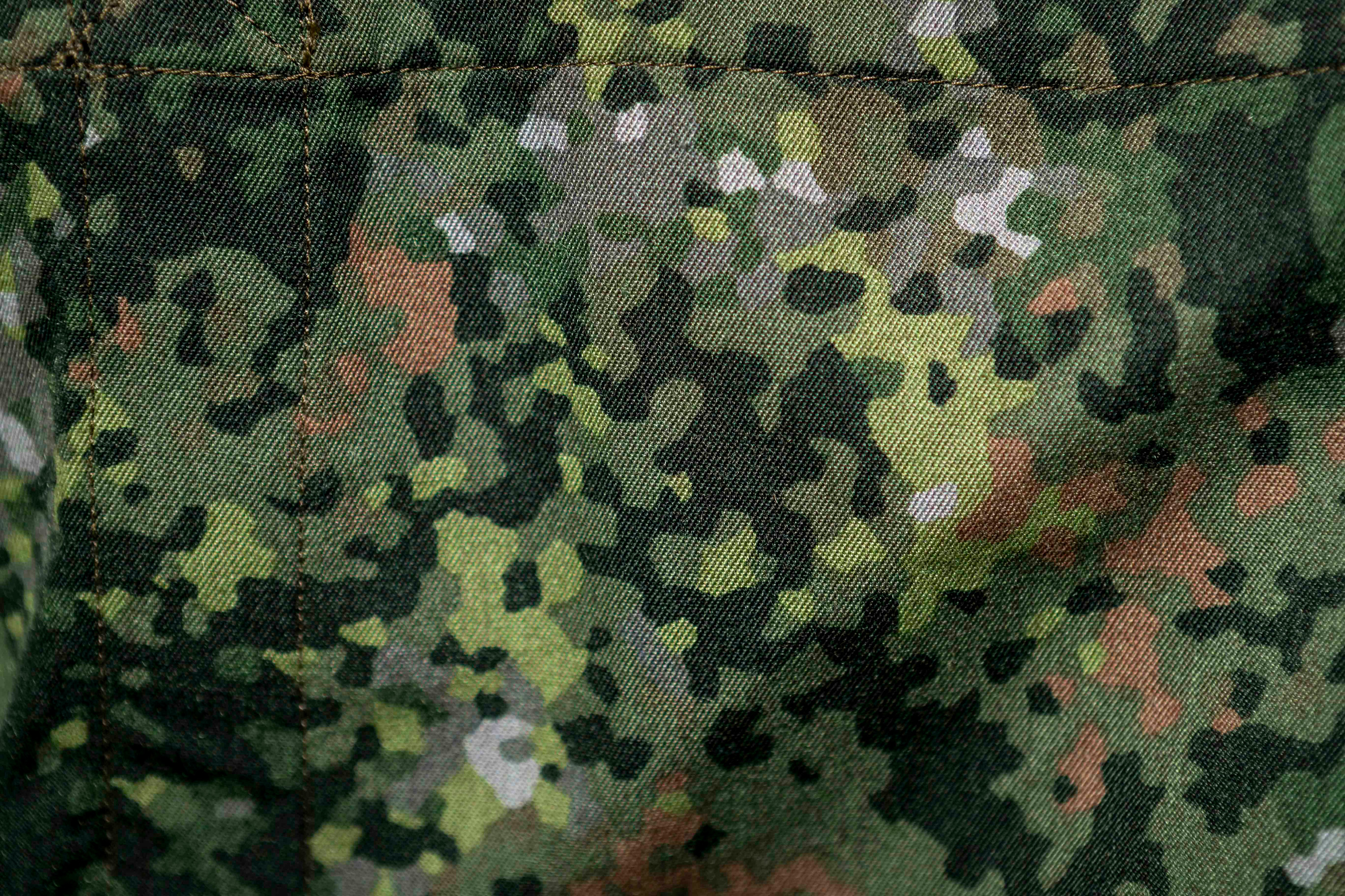 Bergen-Honhe, 13 mei 2019.De Nederlandse militairen van het 414 Dui/Ned Pantser Bataljon krijgen als eerste militairen een nieuwe tankoveral in het nieuwe NFP camouflage patroon.